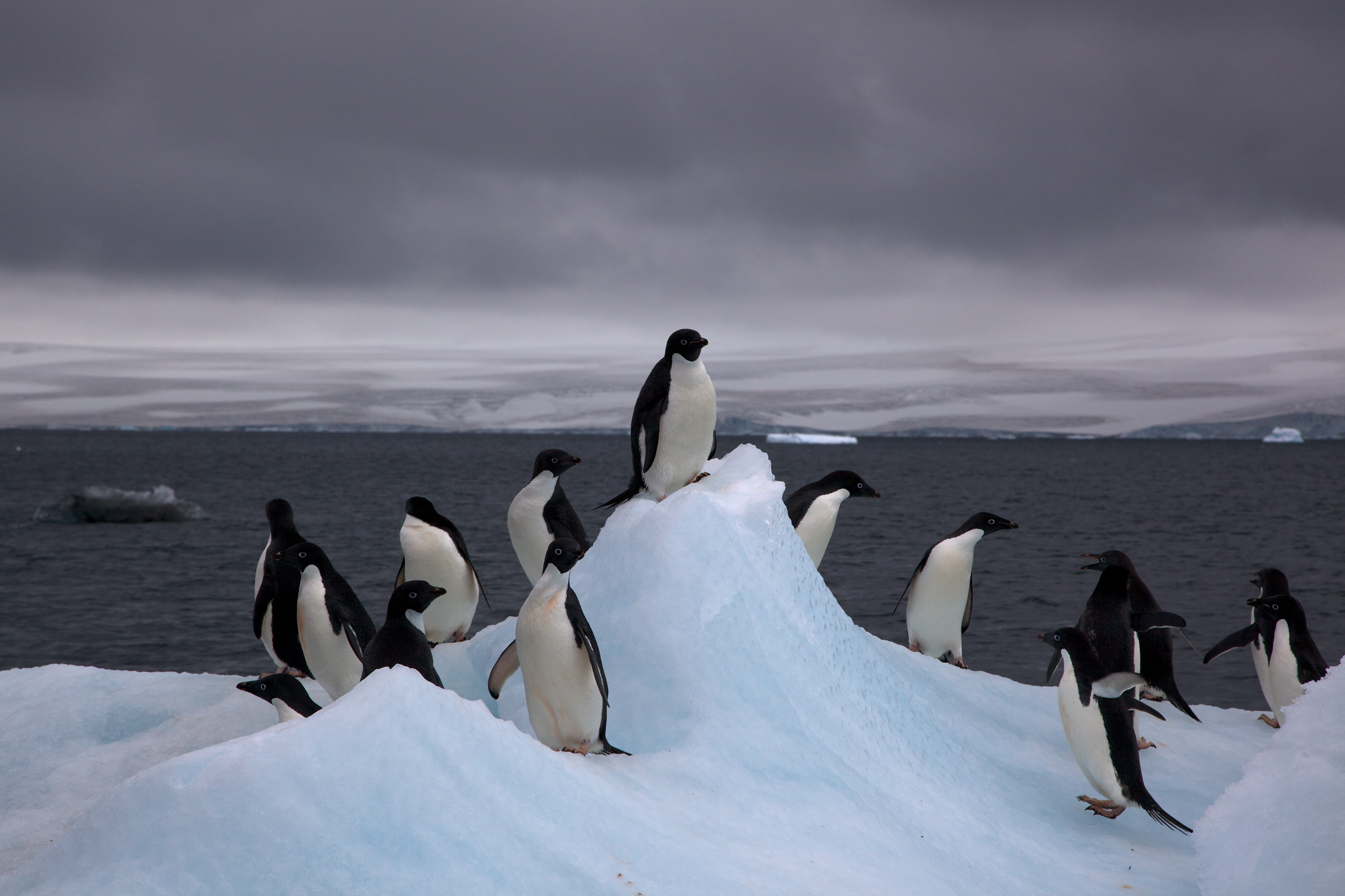 Adelie Penguins (Pygoscelis adeliae) on iceberg.